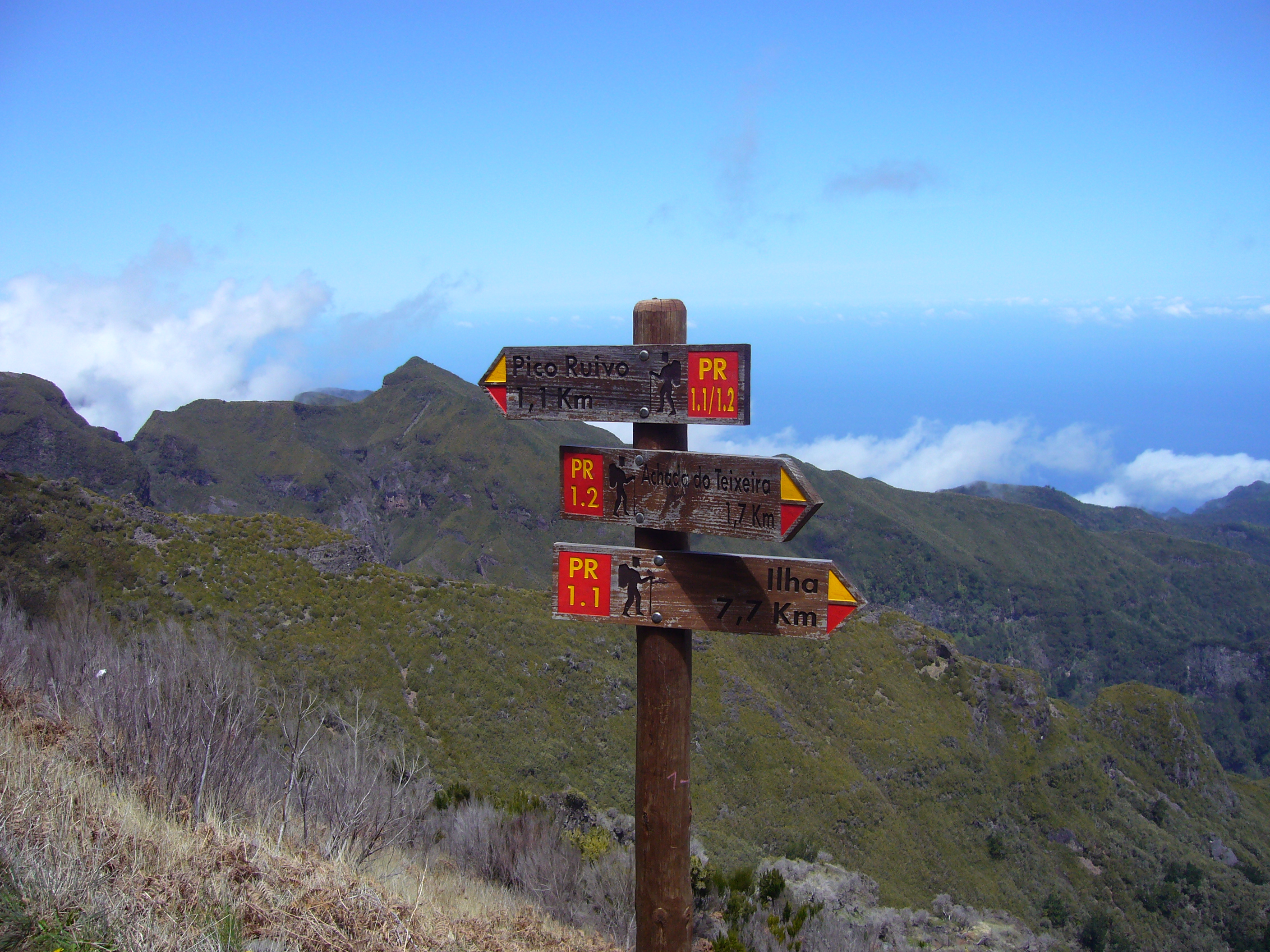 Značení turistických cest na Madeiře.